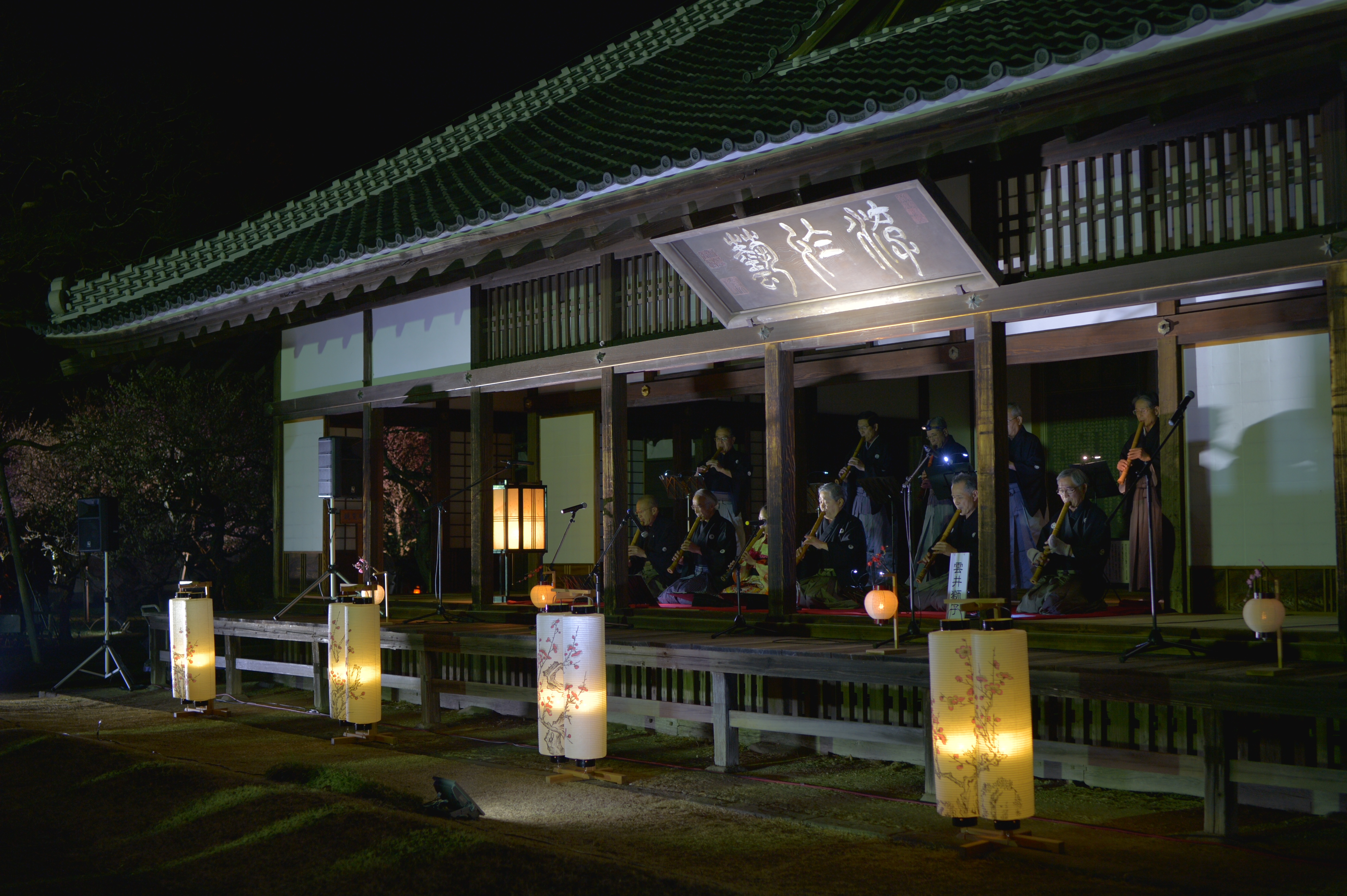 2019年・夜梅祭 第一夜（弘道館）「夜梅と和楽の調べ」による尺八演奏 Nikon Df